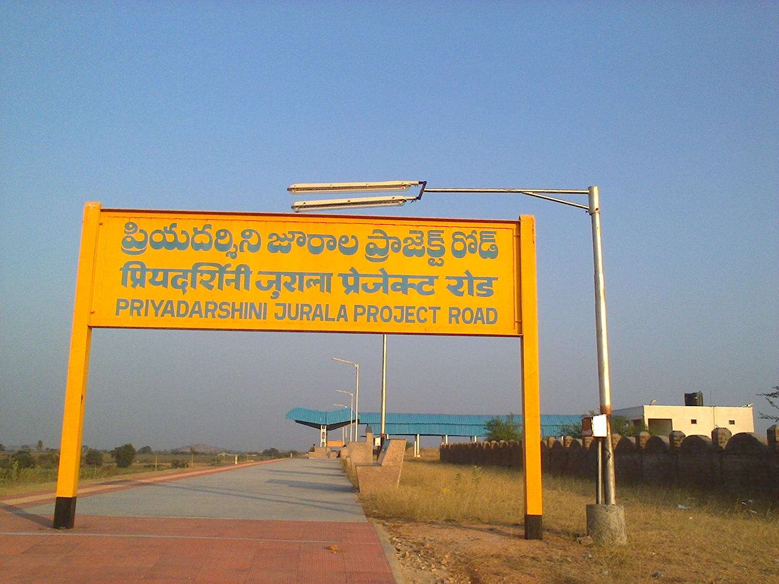 స్టేషన్